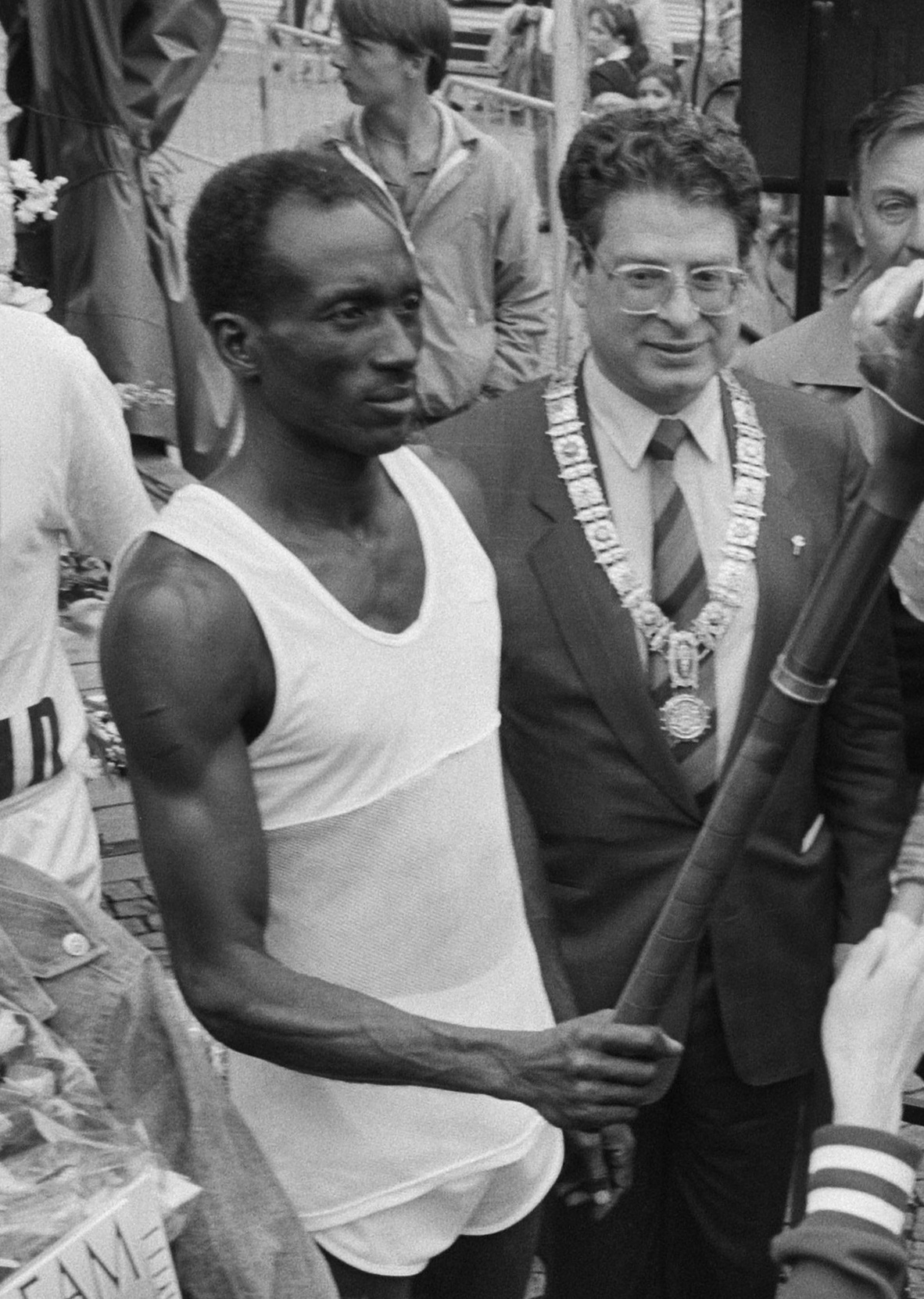 Sport Aid: Afrikaanse marathonloper burgemeester van Thijn (l) en Omar Khalifa (r) op de Dam in Adam